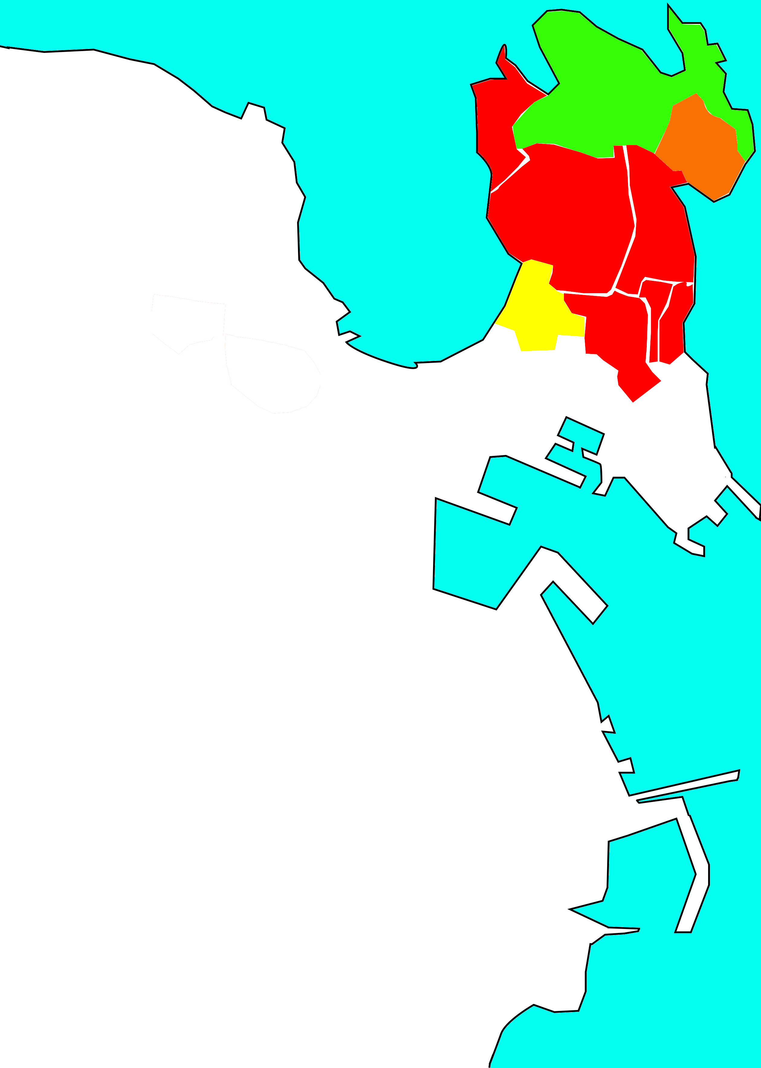 Situación de Monte Alto (incluíndo As Lagoas, As Atochas, Orillamar, Agra de Santo Amaro e Os Pelamios) no concello da Coruña, segundo En laranxa, Durmideiras, en verde área da Torre de Hércules e en amarelo Zalaeta.